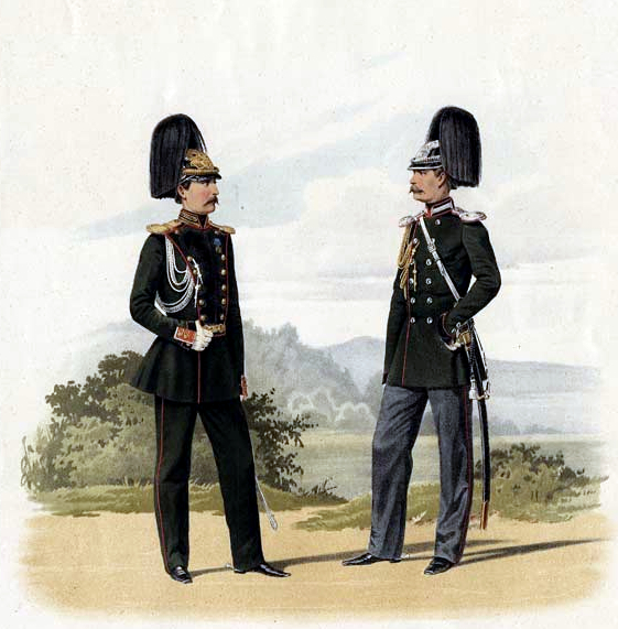 Обер-офицеры Л.-Гв. 1-й Артиллерийской бригады и 1-го Конно-Пионерного эскадрона, окончившие курс в Практических Отделениях Военных Академий, 25 июня 1859. (В празничной форме).